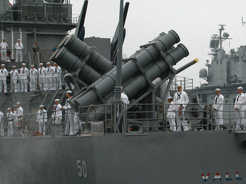 Пусковая установка Mk 141 на корме ракетного крейсера CG-50 Valley Forge